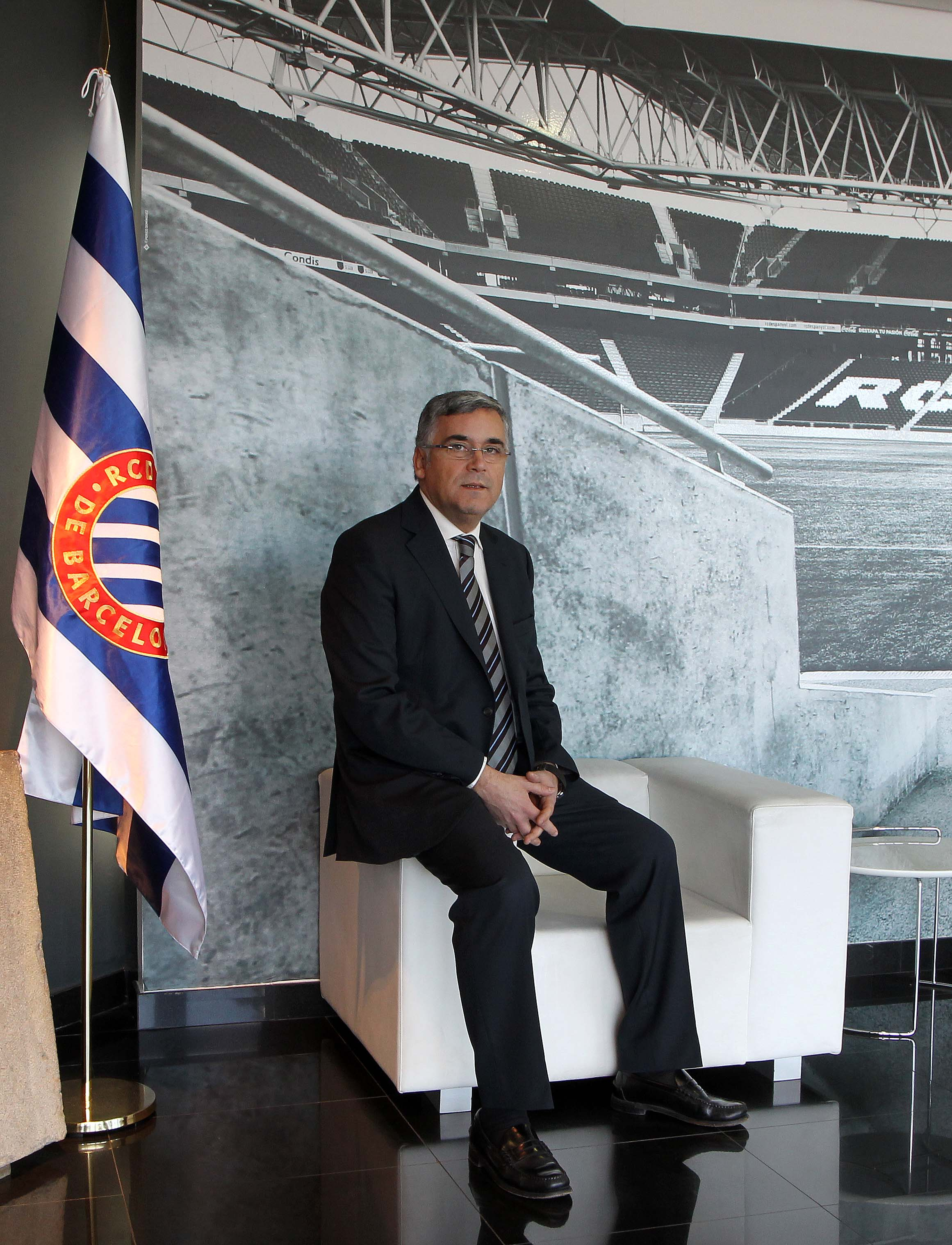 Joan Collet, presidente del RCD Espanyol